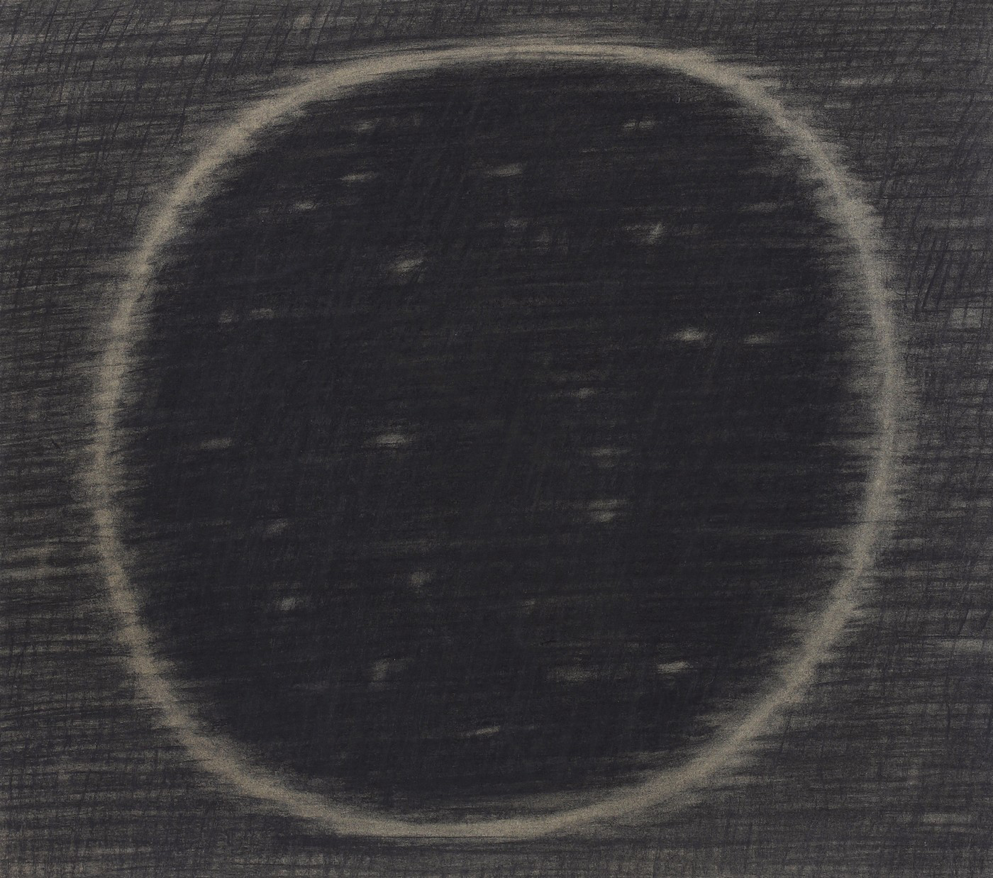 Anežka Kovalová, Černý kruh, 1993